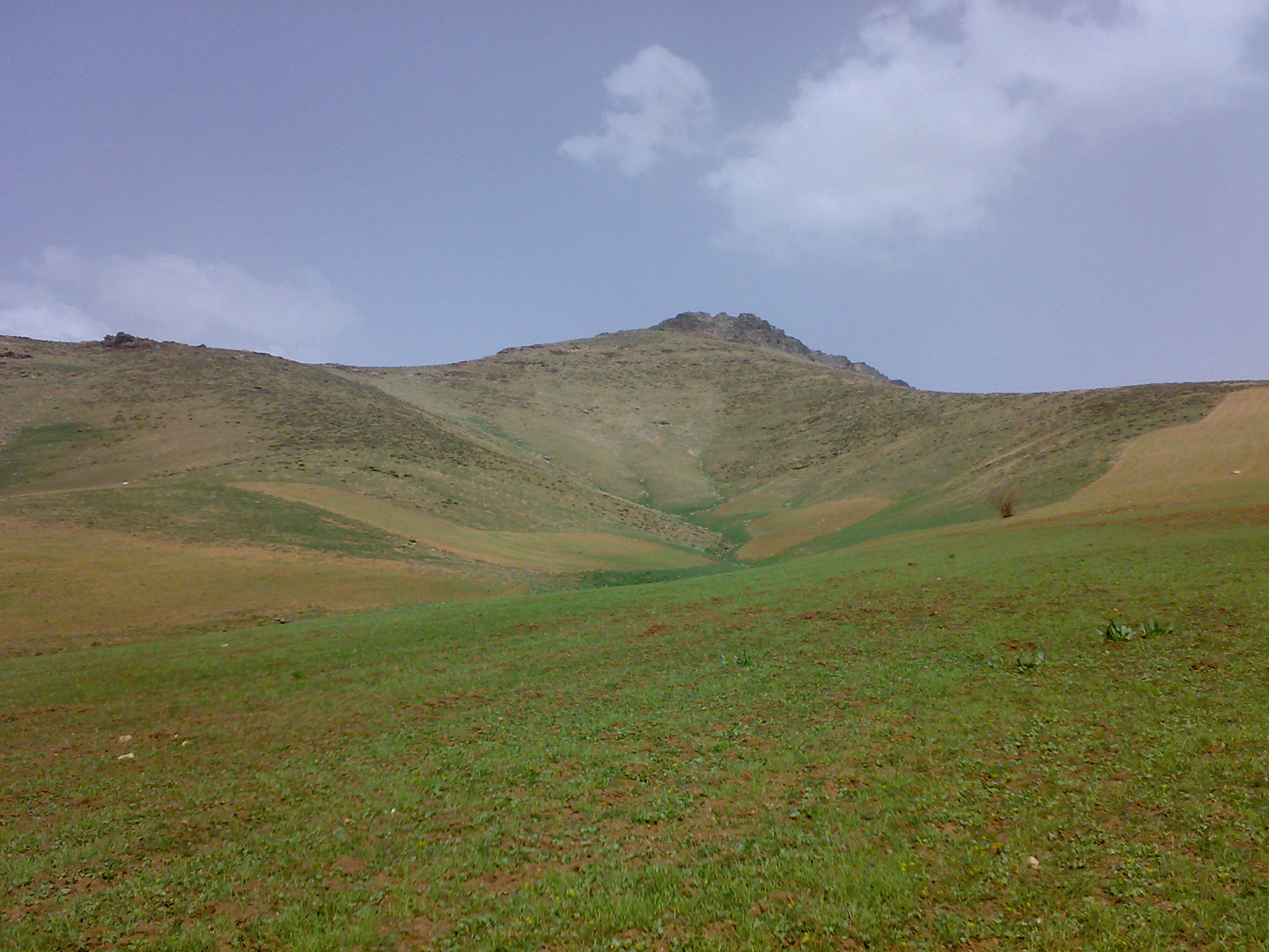 .کوه هه لو با ارتفاع 2055 متر یکی از مناطق دیدنی روستای بهرام آباد می باشد